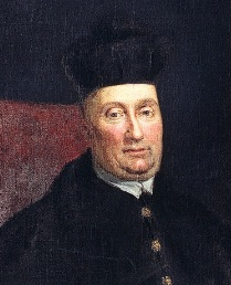 Gerardus Rubens / Abbas Hemiksem